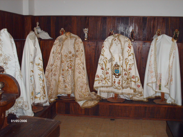 Trajes usados por la escultura de la Virgen del Valle, Bacilica del Valle, isla de Margarita, Venezuela